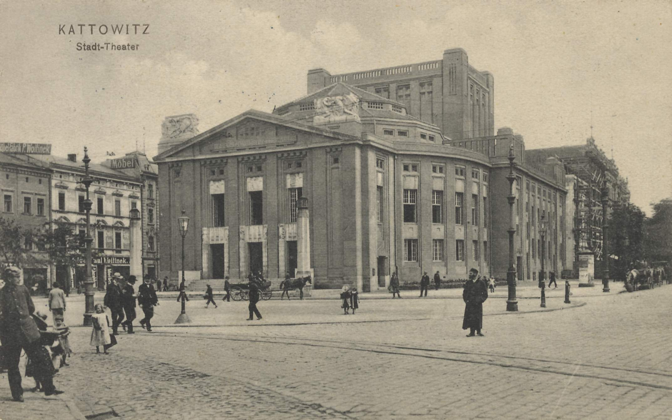 Katowice. Teatr Śląski (niem. Stadttheater), 1909